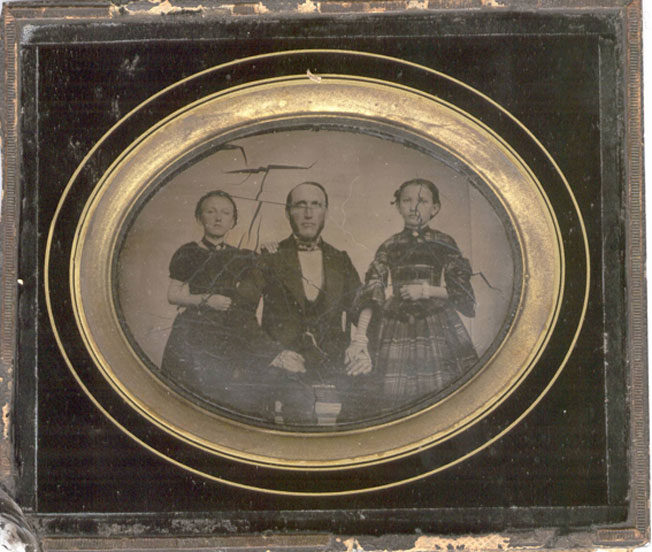 Familienbildnis eines Vaters mit seinen beiden Töchtern. Pannotypie um 1860, vermutlich Österreich oder Deutschland. Man sieht deutlich die Risse der Wachsleinwand, der "Schwachstelle" des Verfahrens. (Sammlung Kralik, Wien )